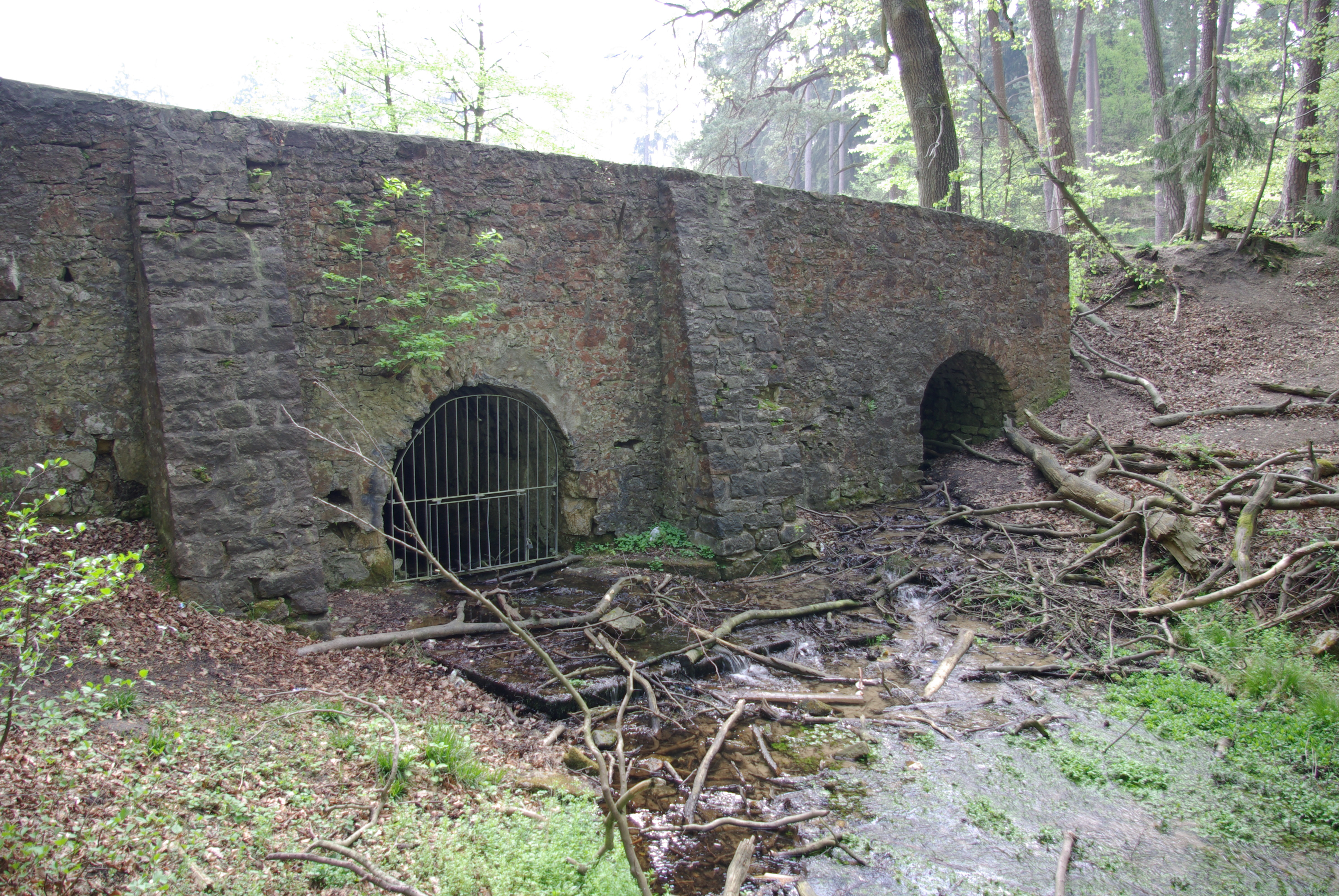 Staumauer des Donoperteiches